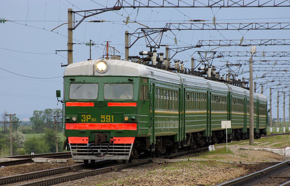 Электропоезд ЭР9Е-591 на разъезде Высочино, Батайск.